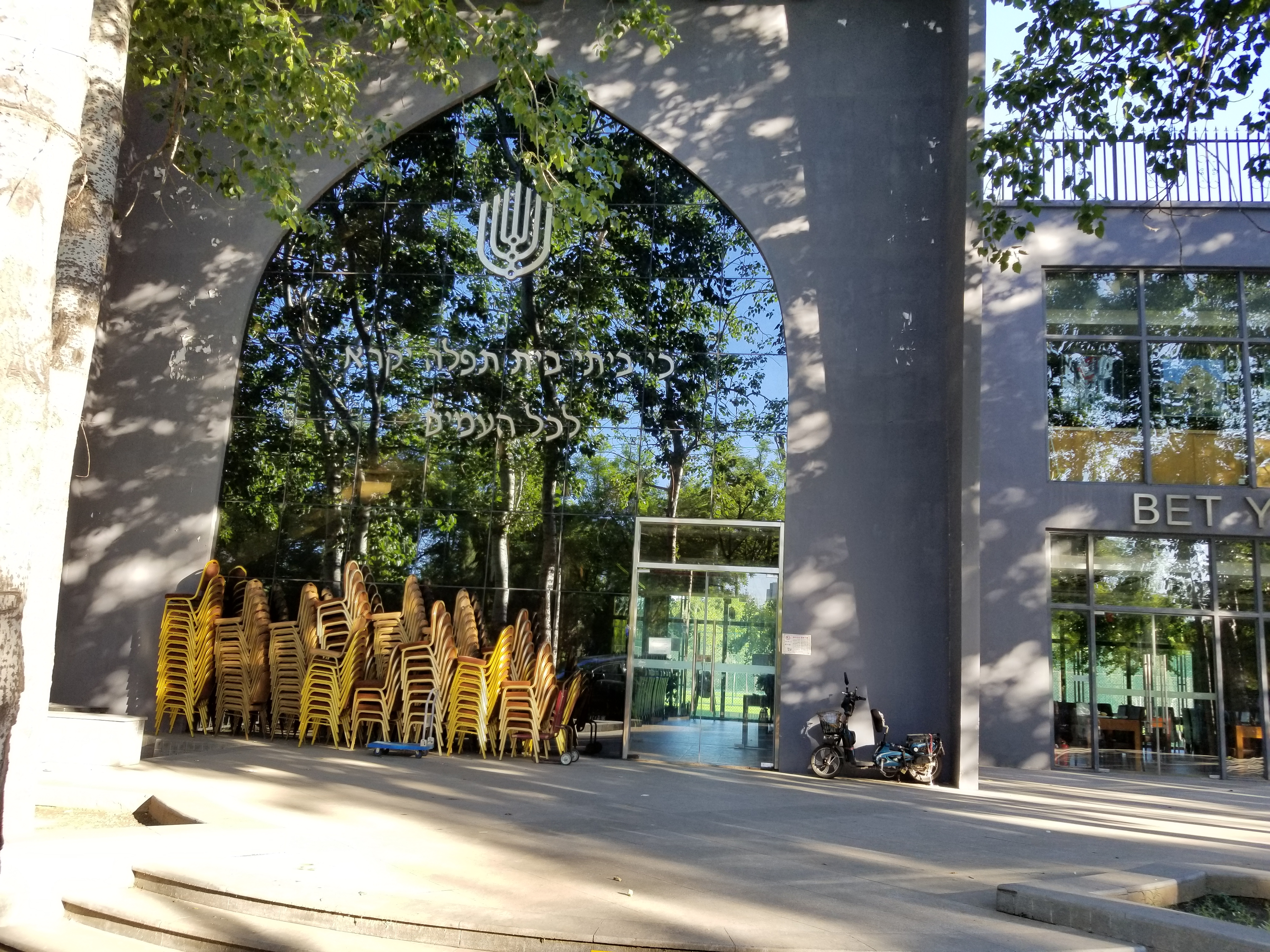 בית חב"ד בבייג'ינג